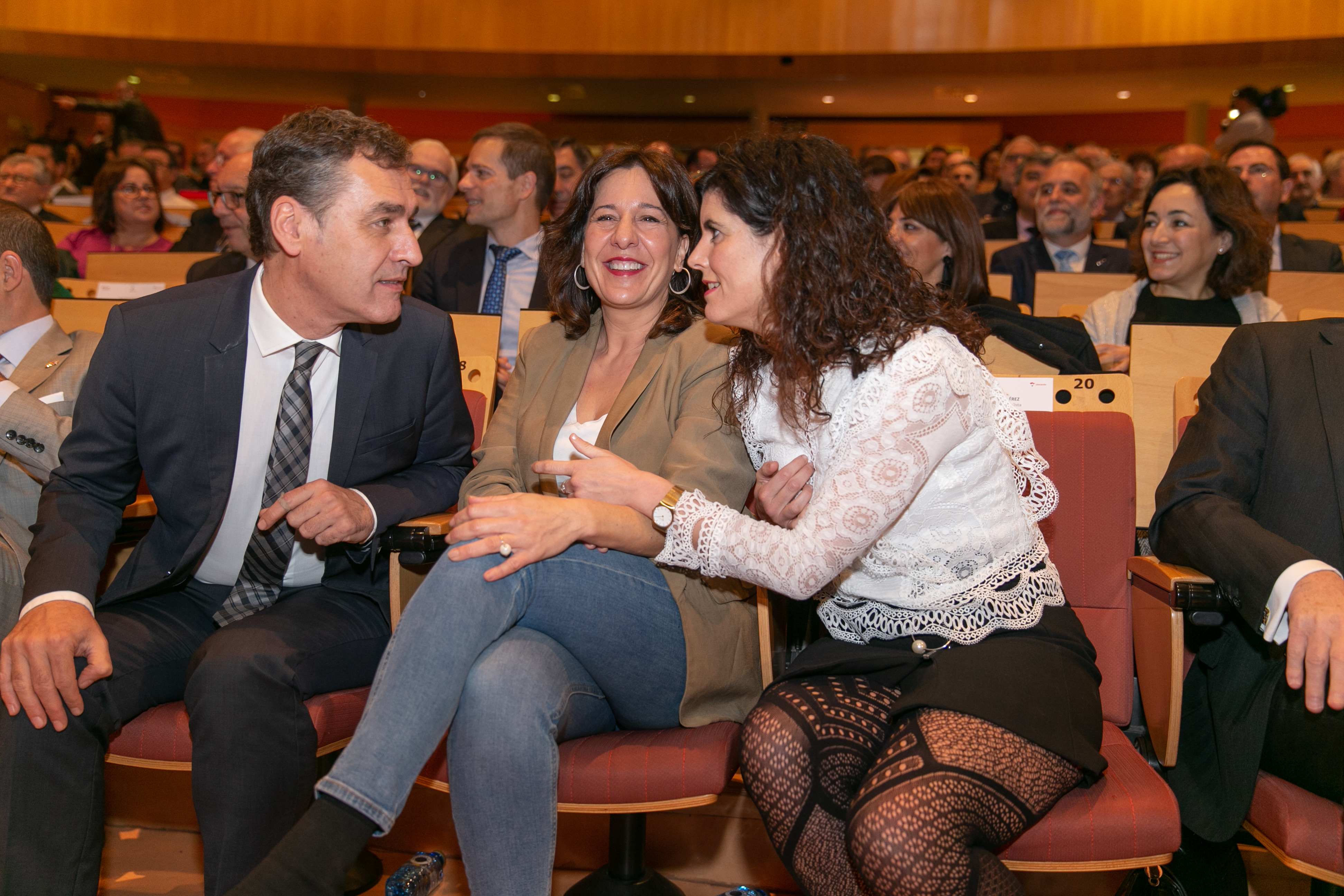 CIUDAD REAL, 22 de noviembre de 2019.- El jefe del Ejecutivo autonómico, Emiliano García-Page, preside, en el Paraninfo de la Universidad de Castila-La Mancha de Ciudad Real, el acto institucional del Día de la Enseñanza. En la imagen, la consejera de Igualdad y portavoz del Gobierno regional, Blanca Fernández, con el delegado del Gobierno, Francisco Tierraseca y la vicepresidenta de las Cortes regionales, Josefina Navarrete (d). (Fotos: A. Pérez Herrera // JCCM)